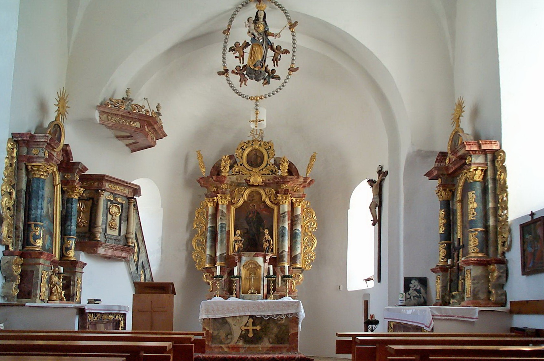 Hohenthann, Türkenfeld 25. Filialkirche St. Ägidius. Ehemalige Schlosskapelle. Kleiner ungegliederter Saalbau mit eingezogener Chorapsis und Dachreiter. Romanischer Bau des 12./13. Jahrhunderts, teilweise barock verändert; mit Ausstattung.